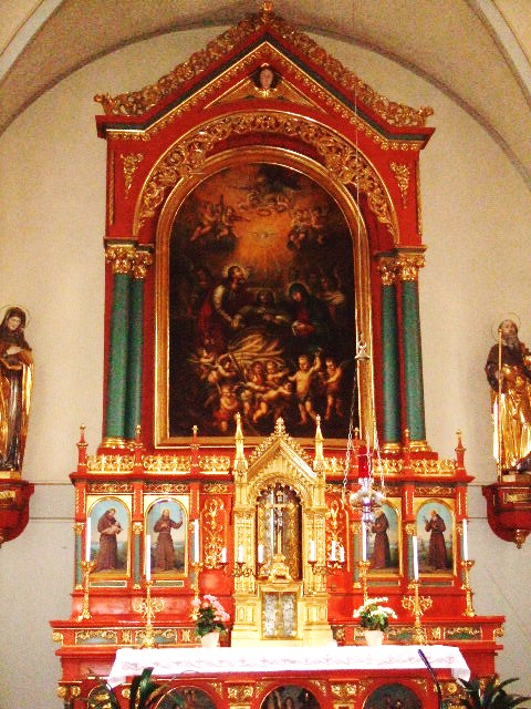 Pfarrkirche St. Josef (ehem. Kapuzinerkirche), Immenstadt; neuromanischer Seitenaltar